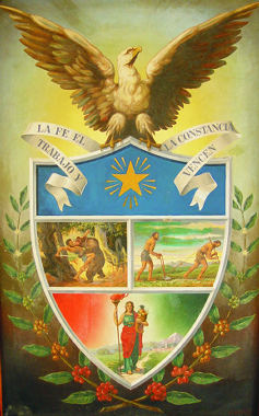 La estrella sobre fondo azul simboliza la fe tradicional del pueblo. El cuadro primero de la franja céntrica muestra la lucha titánica de los colonizadores, para vencer la selva y las fieras y tiene el mérito de ser un episodio vivido realmente por don Sandalio Guerrero, en los días de la colonización, en la región de “El Recreo”, cuando sostuvo una lucha a muerte con un oso. El segundo cuadro de esta faja es una alegoría que muestra el esfuerzo sobrehumano de los colonos. La faja inferior es el símbolo de la constancia, que tiene como complementos al amor y a la esperanza, simbolizados en la túnica verde y roja de la mujer, en la antorcha que empuña y en los resplandores que la rodean. Frutos elocuentes de la constancia en el trabajo son los que llenan el cuerno que en la mano izquierda lleva la mujer y los preciosos y muy variados de las ramas de café que enmarcan el Escudo, granos que constituyen la mayor riqueza de Caicedonia. El águila con las alas abiertas y la mirada en el azul del cielo, significa la altivez del pueblo y la grandeza de sus aspiraciones.